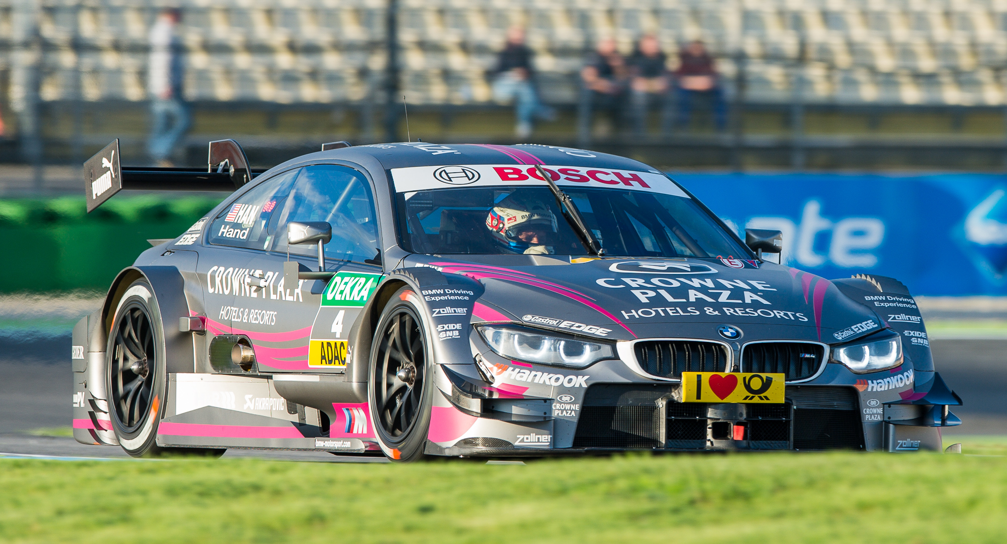 Crowne Plaza Hotels BMW M4 DTM,DTM,Deutsche Tourenwagen Masters,Hockenheimring,Joey Hand,Motorsport,RBM,Racing Bart Mampaey